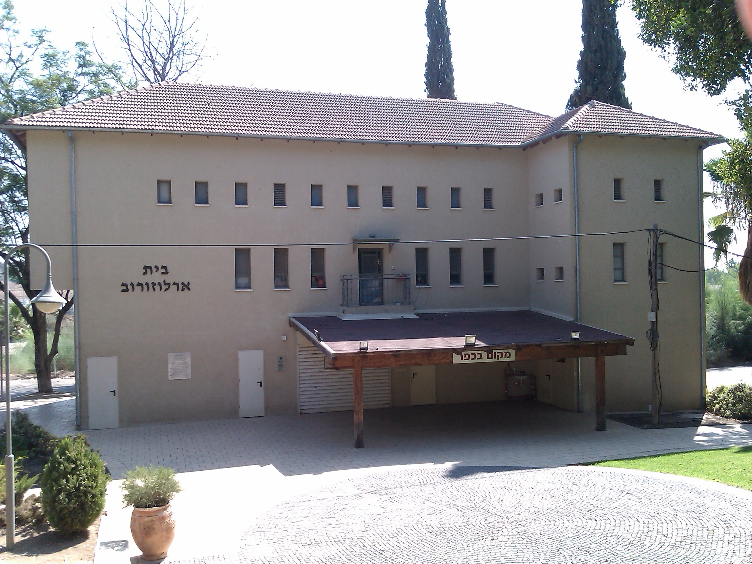 מושבת בצלאל היא מפעל התיישבותי שהוקם על יד "בצלאל" ופעל באזור בן שמן בין השנים 1914-1910. במושבה יושבו צורפים עולים מתימן, מתוך מטרה ליצירת שילוב ציוני בין חיי האומנות המסורתית לעיבוד האדמה. בית ארלוזורוב בכרם בן שמן.